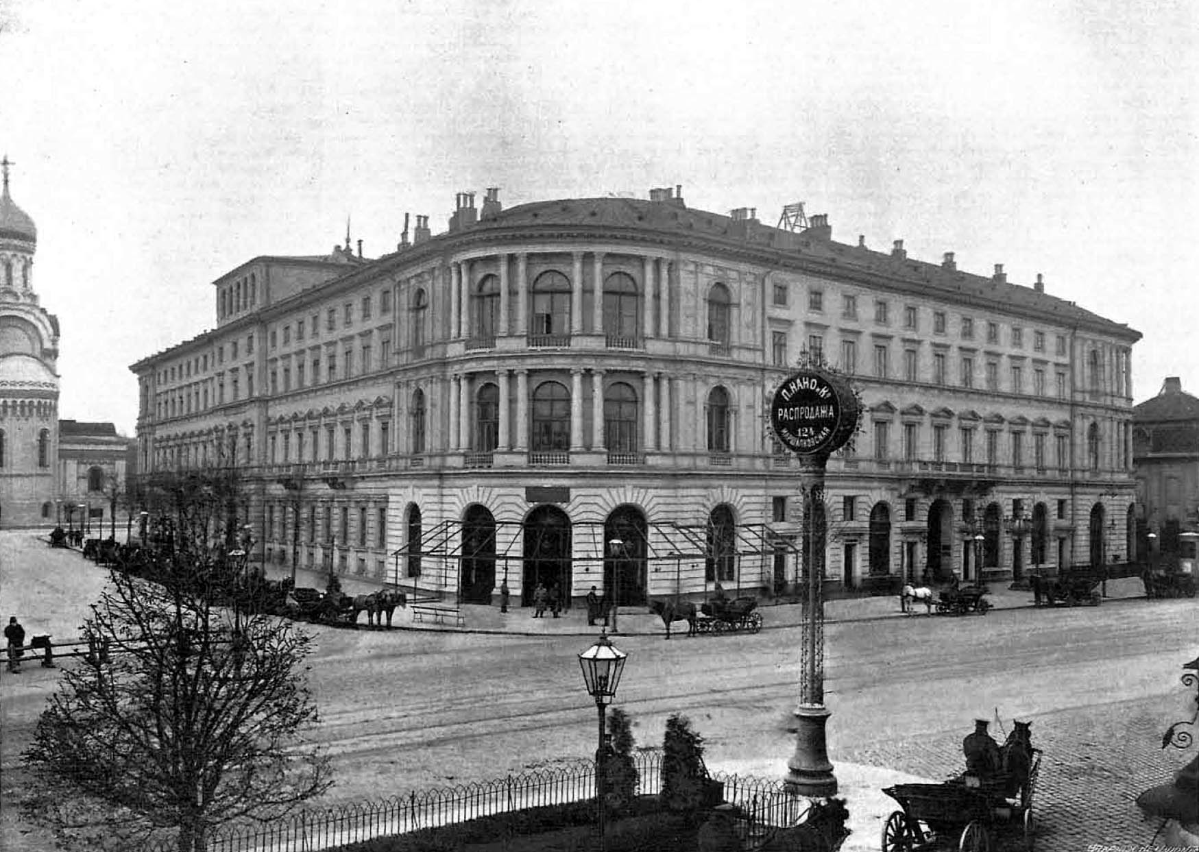 Готель "Європейський" у Варшаві. Збудований за проектом Генрика Марконі (1855).